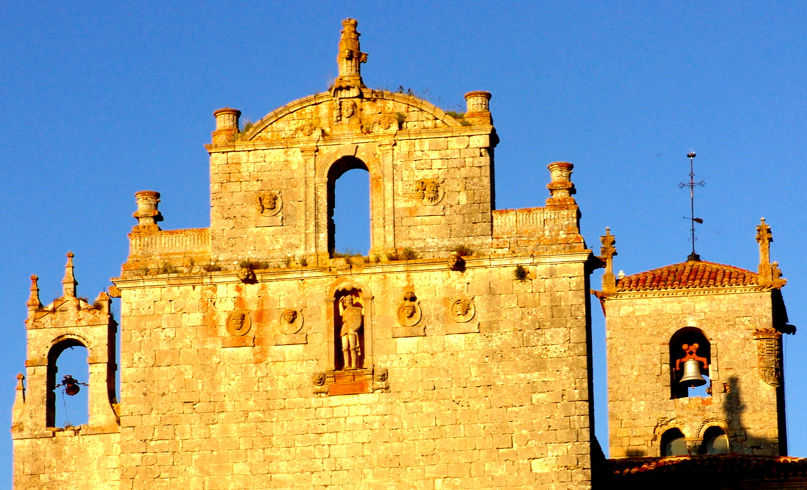 Espadañas y torre cidiana, detalle, Monasterio de San Pedro de Cardeña, Castrillo del Val, Burgos, España